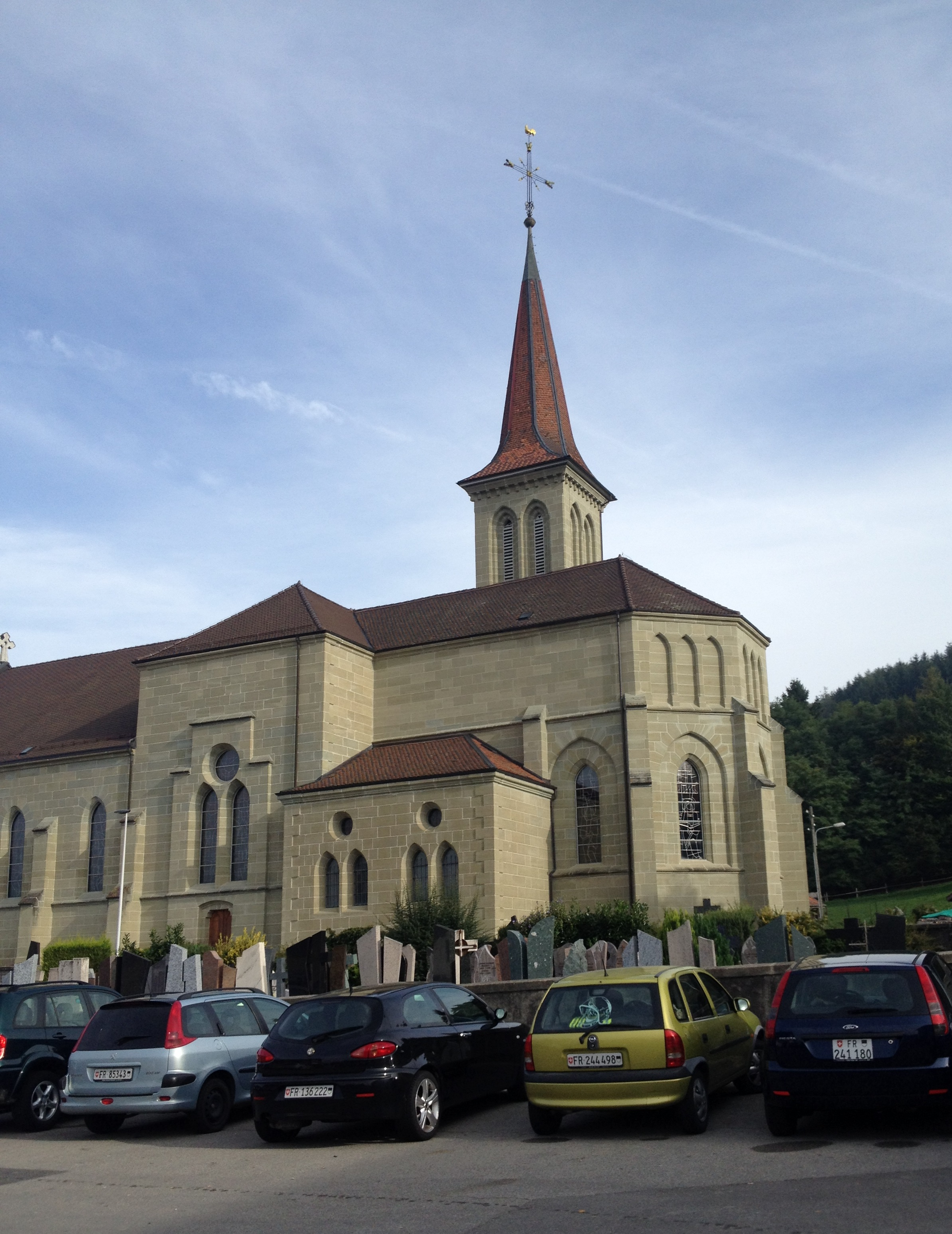 L'église Saint-Maurice d'Ursy, en Suisse.